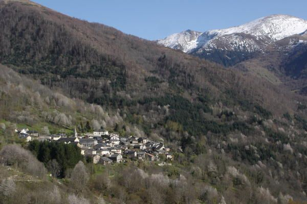 Village de Gestiès (Haute-Ariège), sous le Pic de Baljésou